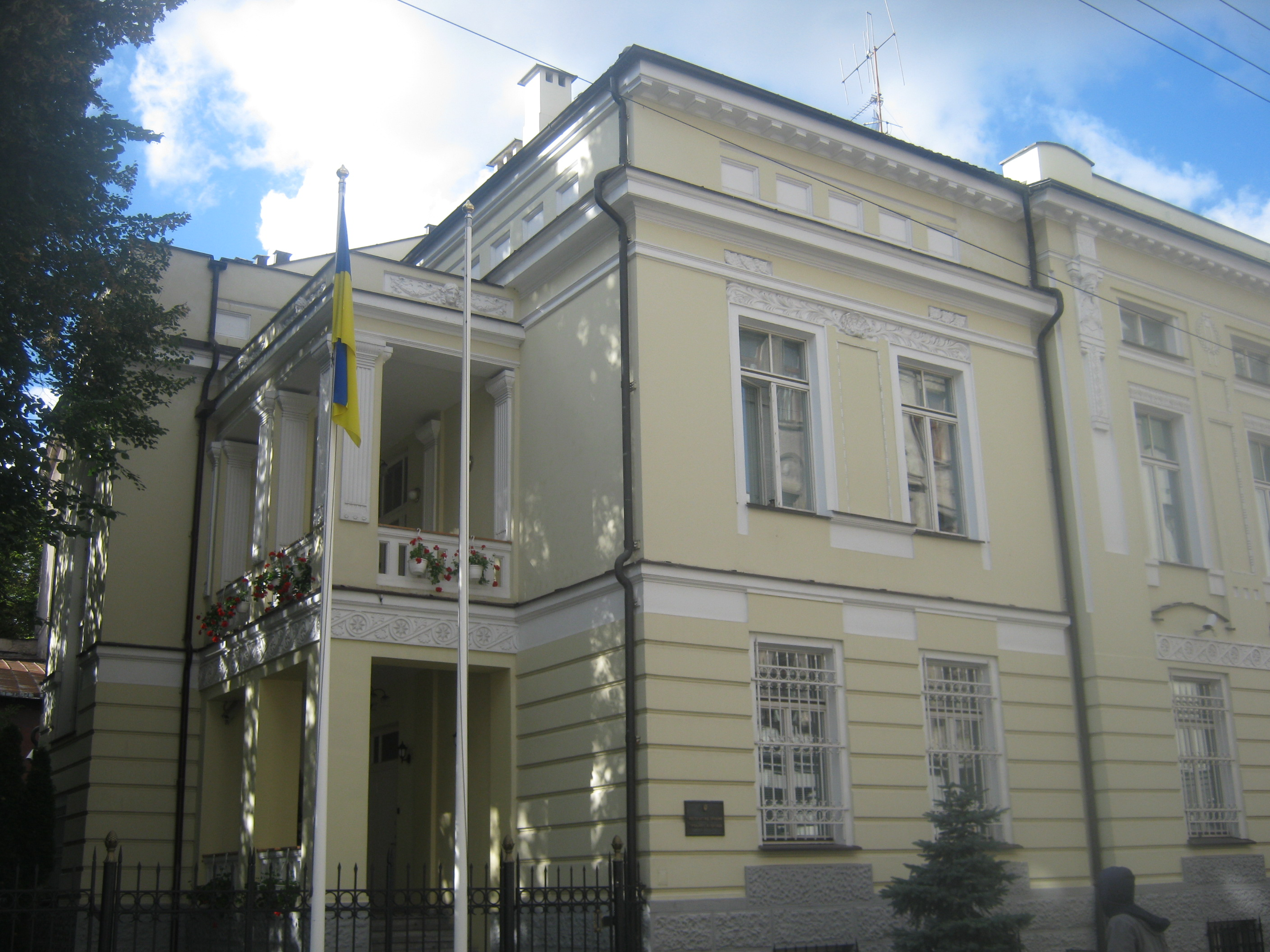 Embassies in Vilnius